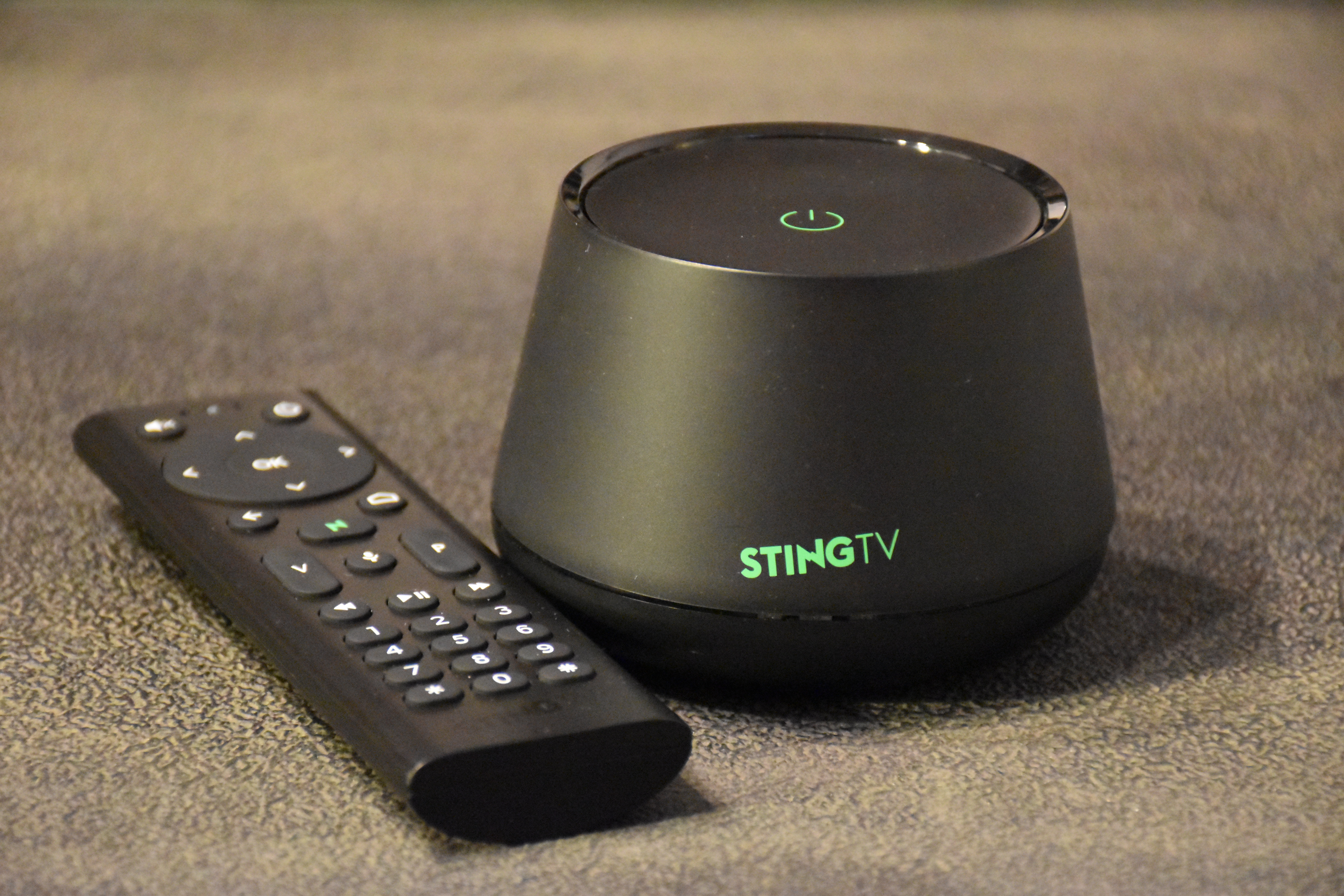 הסטרימר שמסופק עם שירות הטלוויזיה STINGTV והשלט שלו.